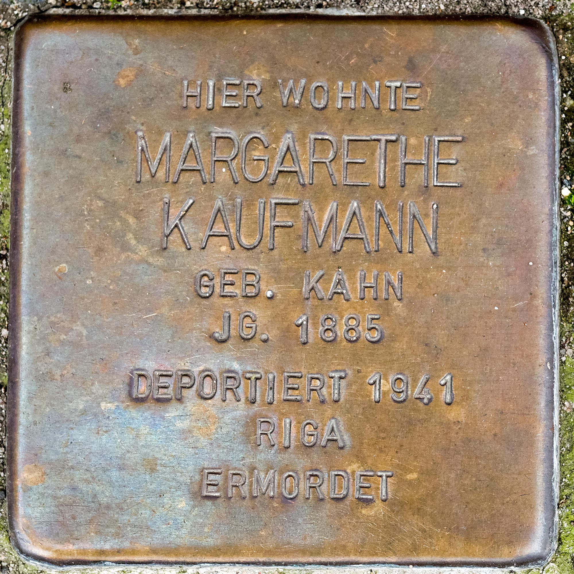 tolperstein Kaufmann, Margarethe